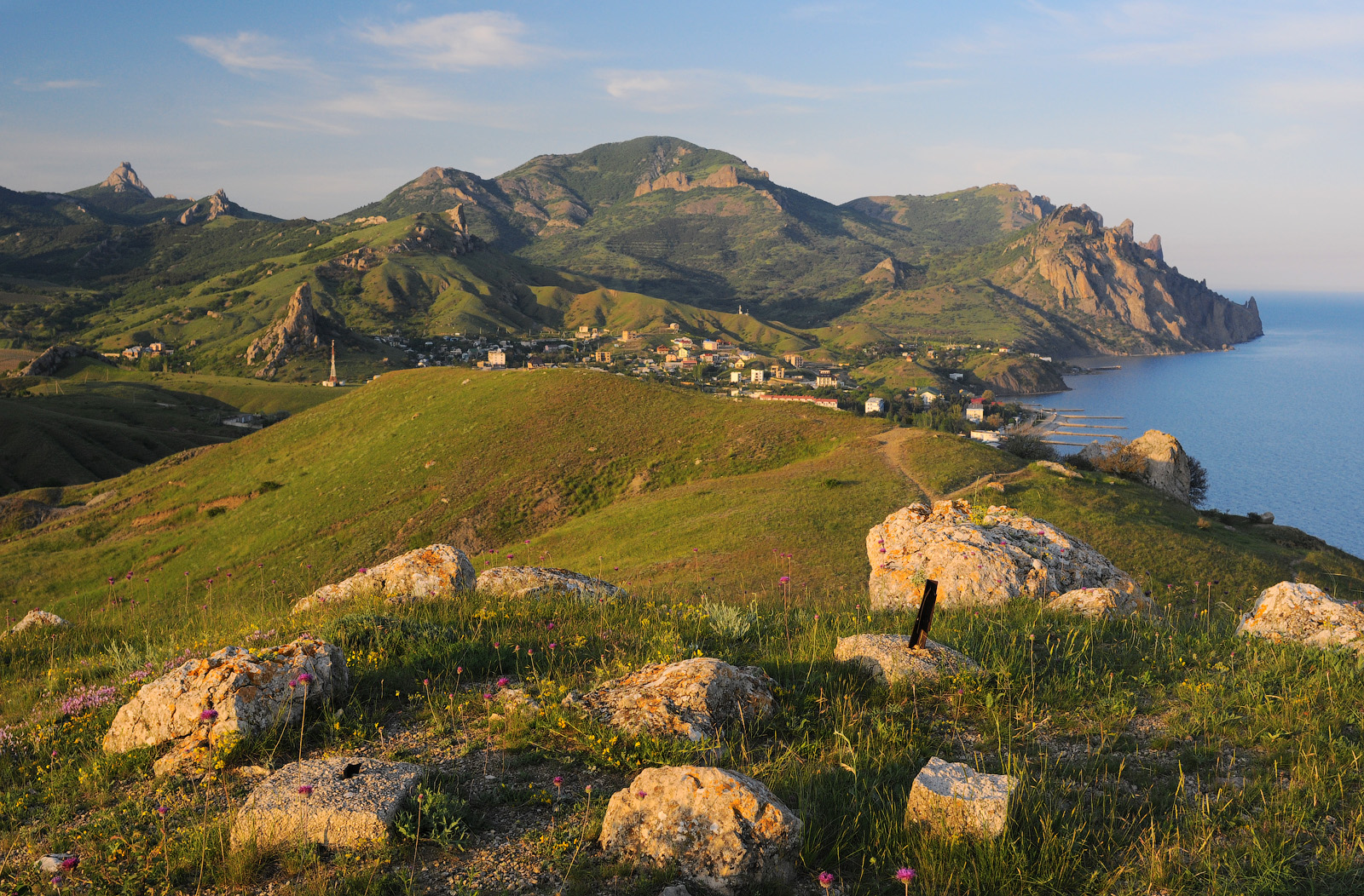 Вид на Карадаг з передгір'я Ечкідагу